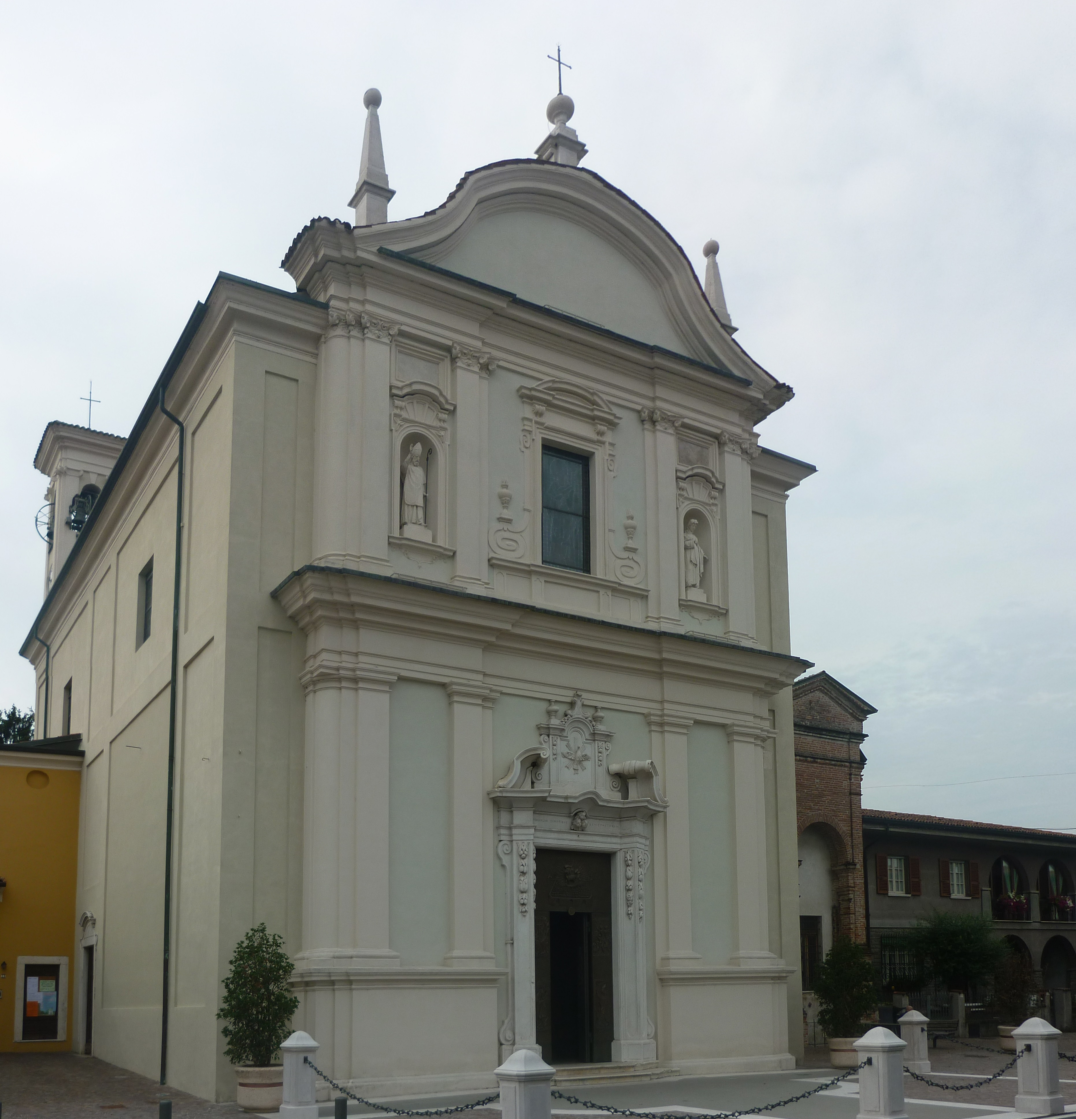 Facciata della chiesa dei santi Siro e Lucia con sagrato